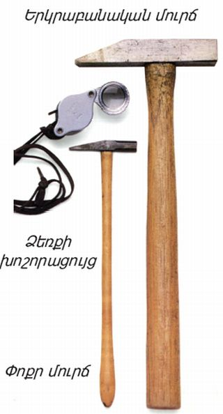 Երկրաբանի աշխատանքային գործիքներ